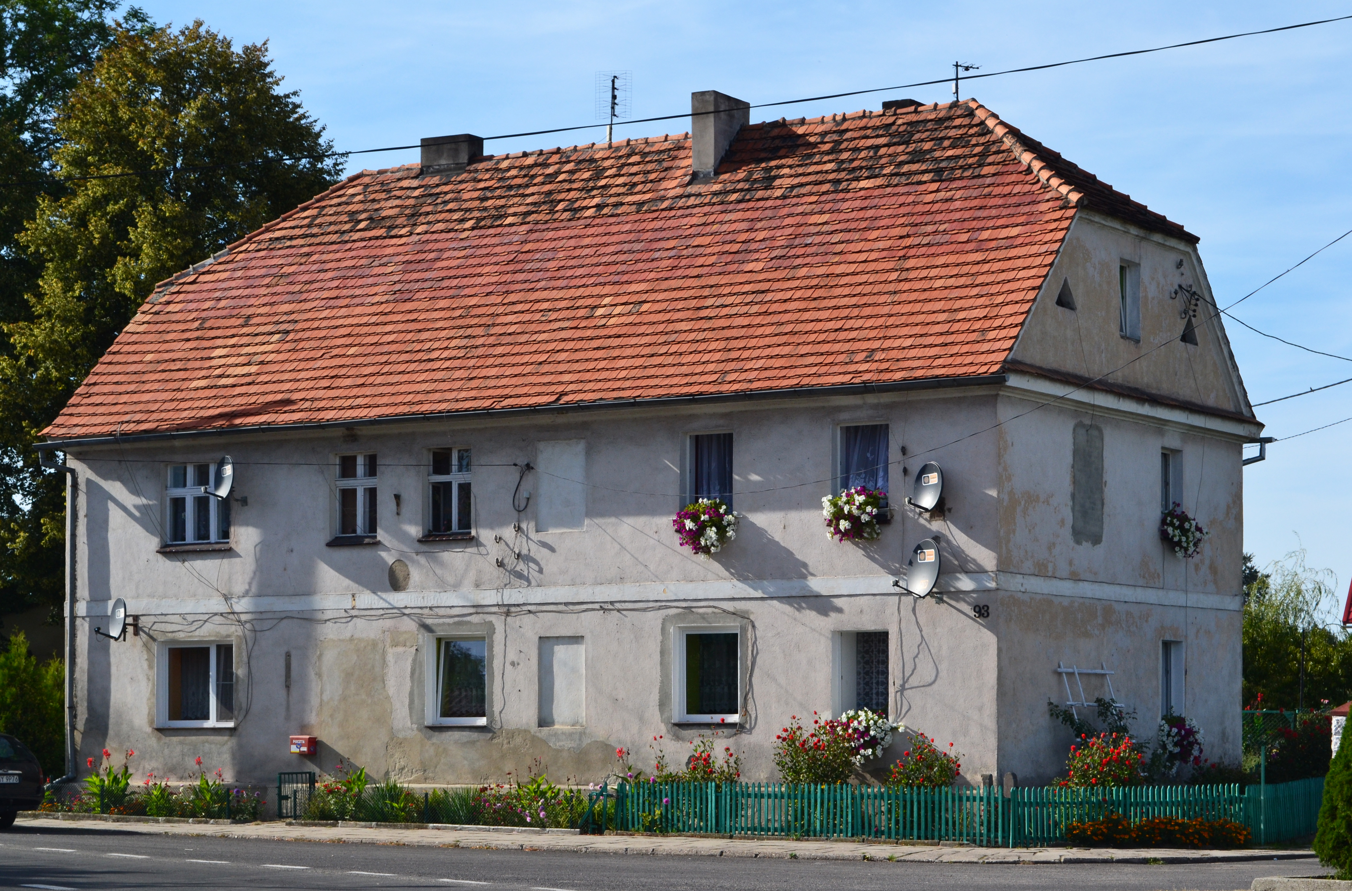 Kamienica - dom gminny nr 93, obecnie poczta 09.1966.